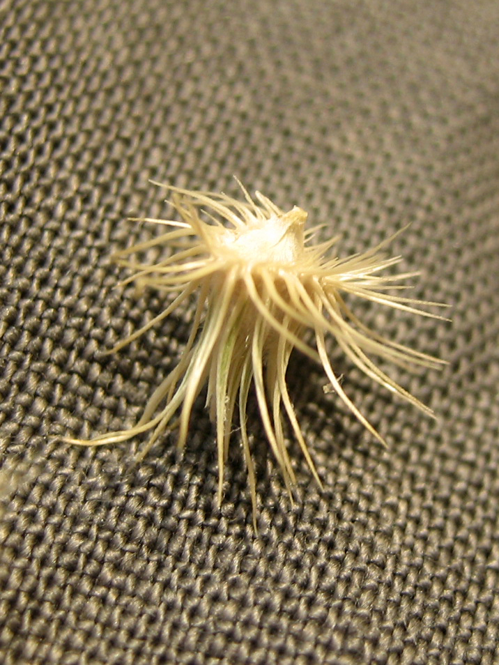 Cenchrus biflorus ou cramcram (également cram-cram)accroché sur un tissu